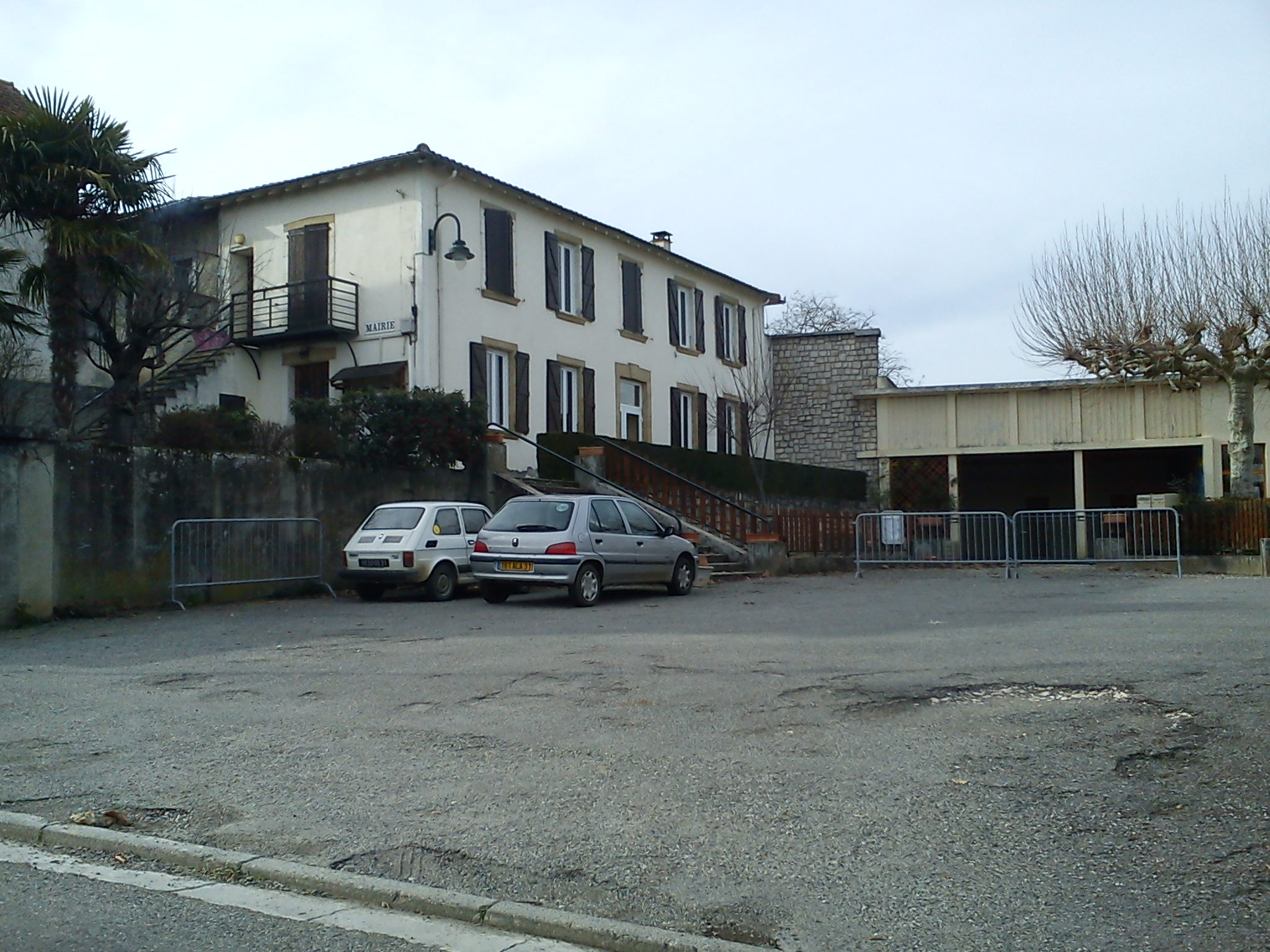 Lussan-Adeilhac (mairie)